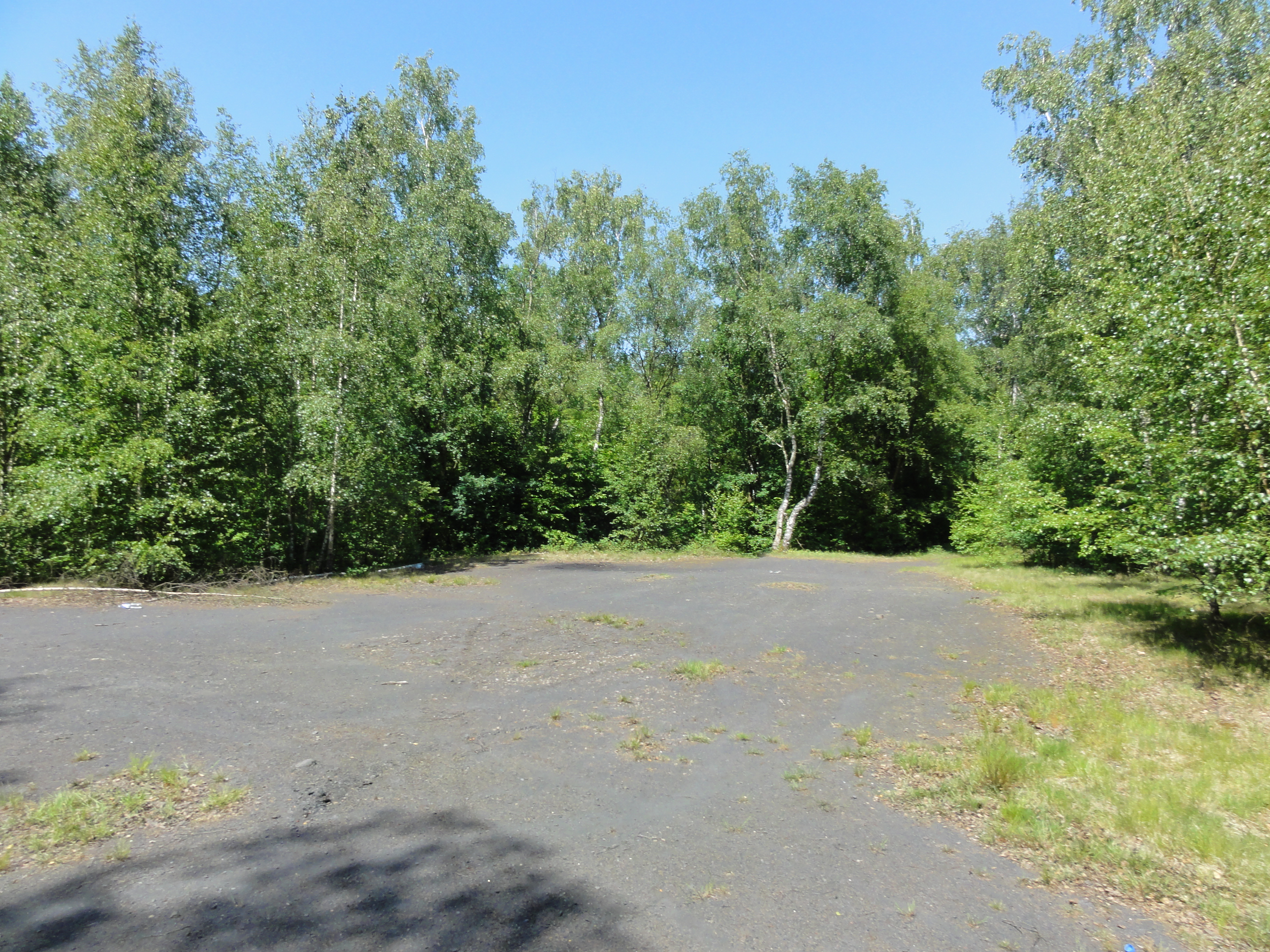 Terril n° 173A dit Vicoigne Ouest, Fosse n° 3 de la Compagnie des mines de Vicoigne, Raismes, Nord, Nord-Pas-de-Calais, France.